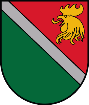 Avots: Madonas novada ģerbonis Šķelts no labās ar sudraba pavedienspāri: sarkans un zaļš; augšā zelta gaiļa galva. Kategorija:Madonas novads Kategorija:Latvijas novadu ģerboņi